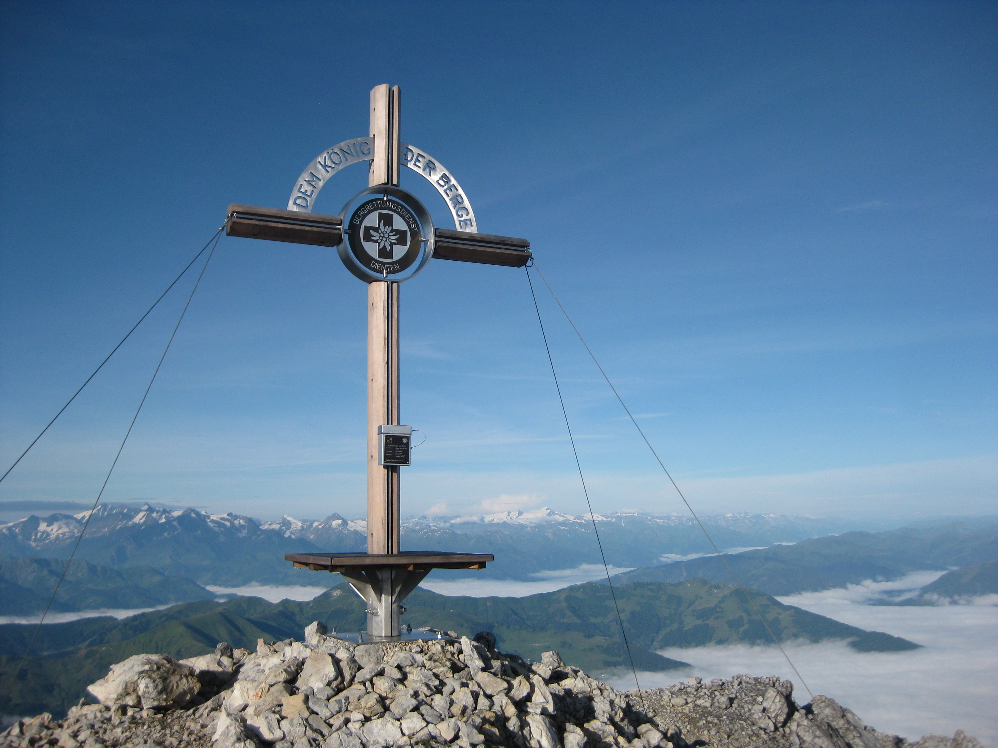 Lammkopf